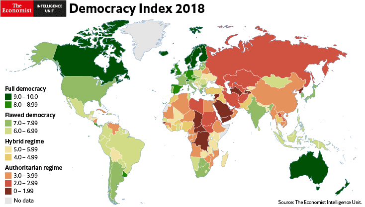 Il s'agit de la carte de l'indice de démocratie. Plus un pays est en vert, plus il est démocratique. Plus un pays est rouge foncé/bordeaux moins il est démocratique.